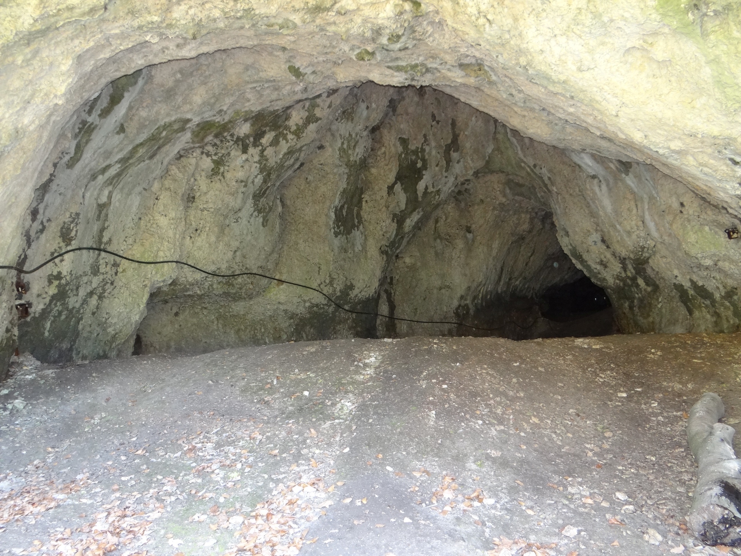 Jaskinia Koziarnia w Ojcowskim Parku Narodowym